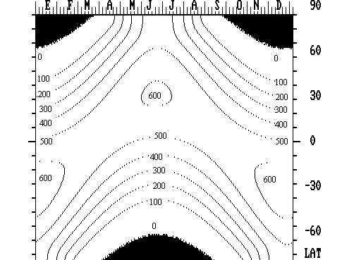 El gráfico muestra la radiación solar incidente atenuada, es decir en la superficie de la Tierra en función de la latitud y de la fecha. Se dibujan puntos con igual insolación diaria dada en langleys (calorias/cm2). La región oscura es la zona de insolación nula por ser noche permanente. Las curvas van de 100 en 100 langleys. Se observan dos lóbulos de radiación solar superficial máxima en los solsticios de verano del hemisferio norte y sur y hacia una latitud de 30º norte y sur (que corresponde a los trópicos) de unos 600 langleys. Se observa que el del hemisferio sur es visiblemente mayor que el del hemisferio norte. Esto se debe a que el solsticio de verano en el hemisferio sur ocurre el 21 de diciembre cuando el Sol está más cerca de la Tierra mientras que en el hemisferio norte ocurre el 21 de junio cuando el Sol está más alejado. Existen varios factores para que el máximo de radiación superficial se dé en los trópicos y no en el ecuador. El Sol se mueve rápido en el cenit a su paso por el ecuador y relentiza su marcha en los trópicos. El Sol está entre 6ºN y 6ºS sólo 30 días y entre 17º,5 y 23º,5 está 86 días. Además el día dura más en los trópicos que en el ecuador. El gráfico es el resultado de un programa realizado por el autor en 1995 para intentar reproducir un gráfico similar vistos en el libro La energía radiante en la atmósfera de Emilio Caimi.